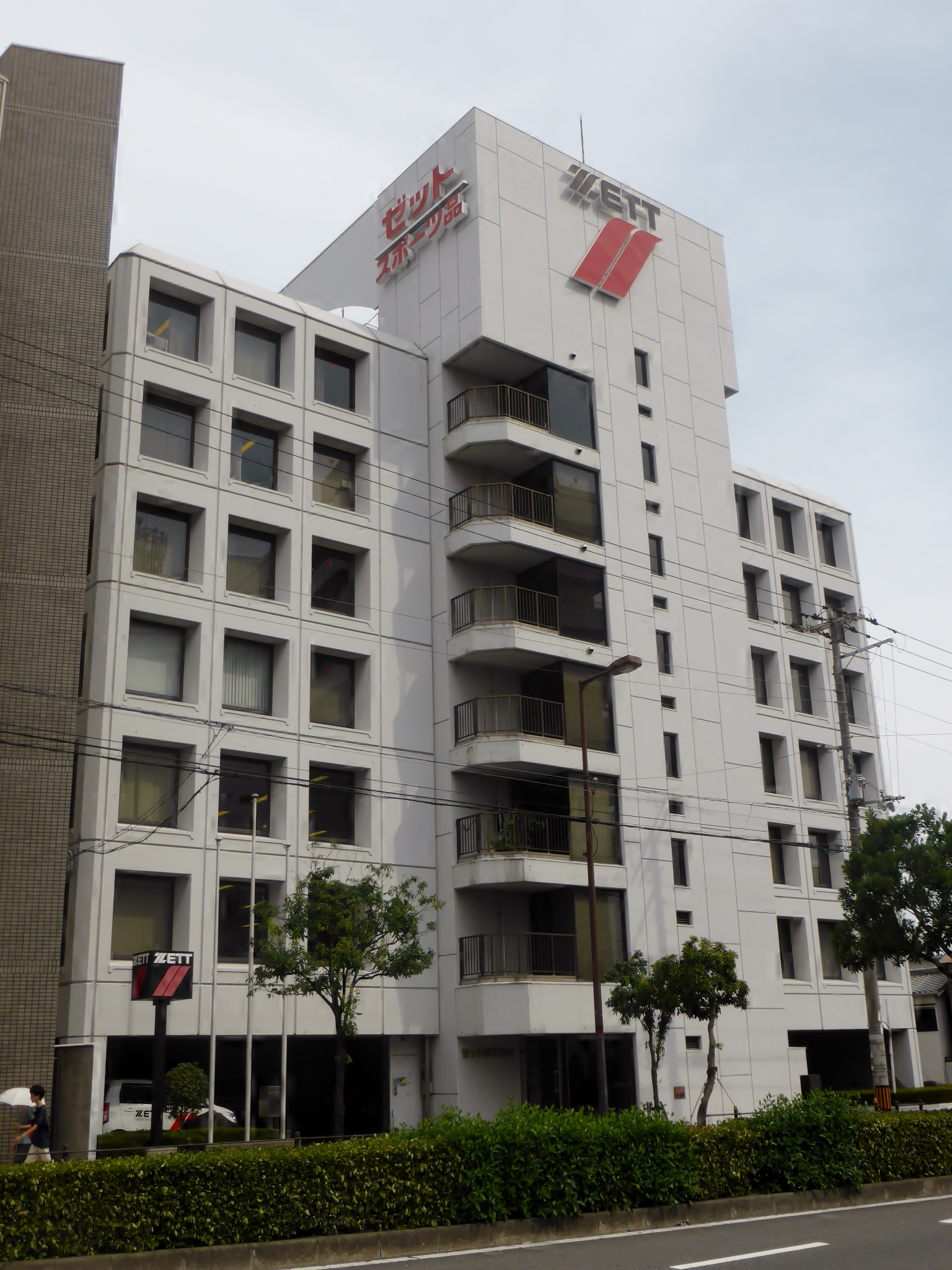 ゼット株式会社本社を撮影